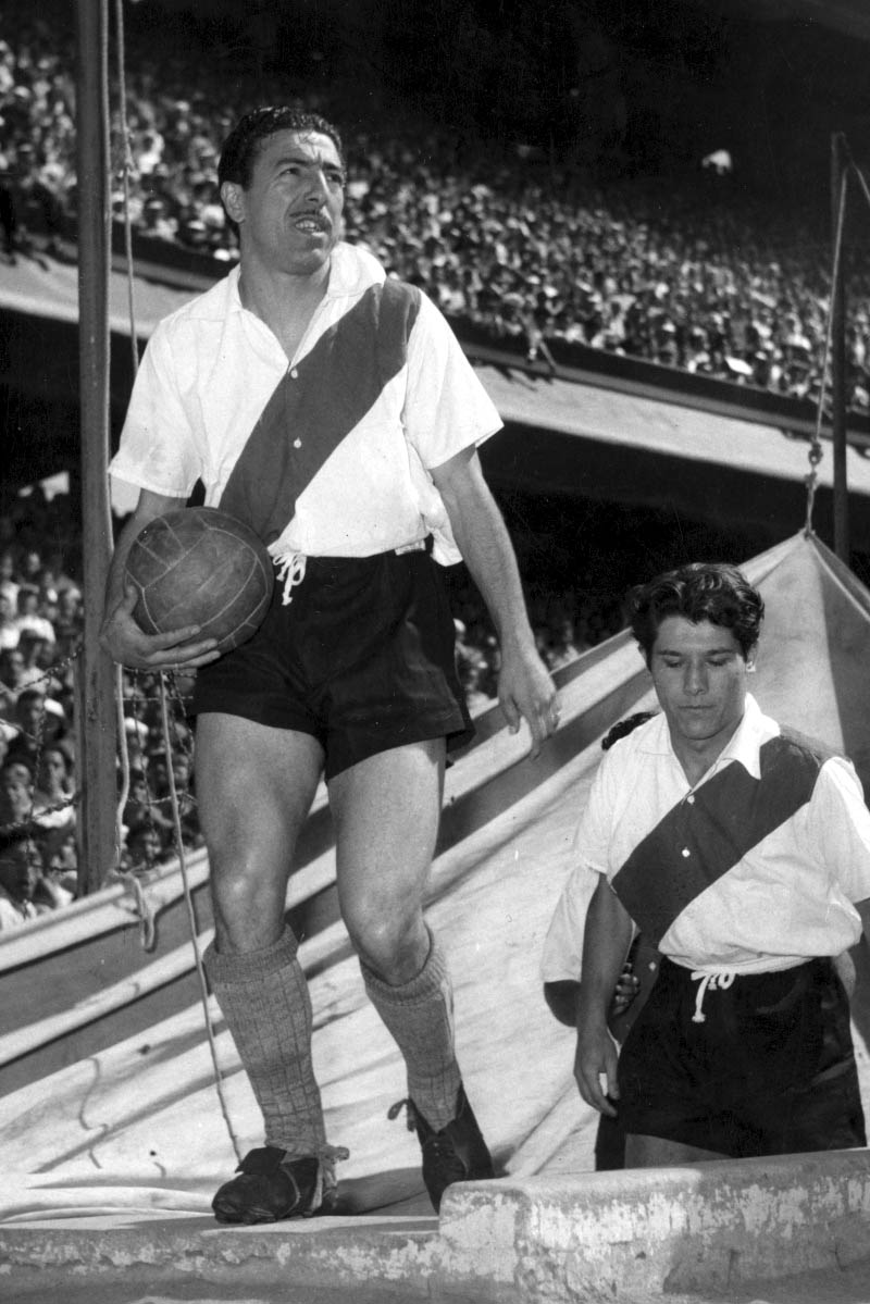 Ángel Labruna y Omar Sívori ingresando a La Bombonera.